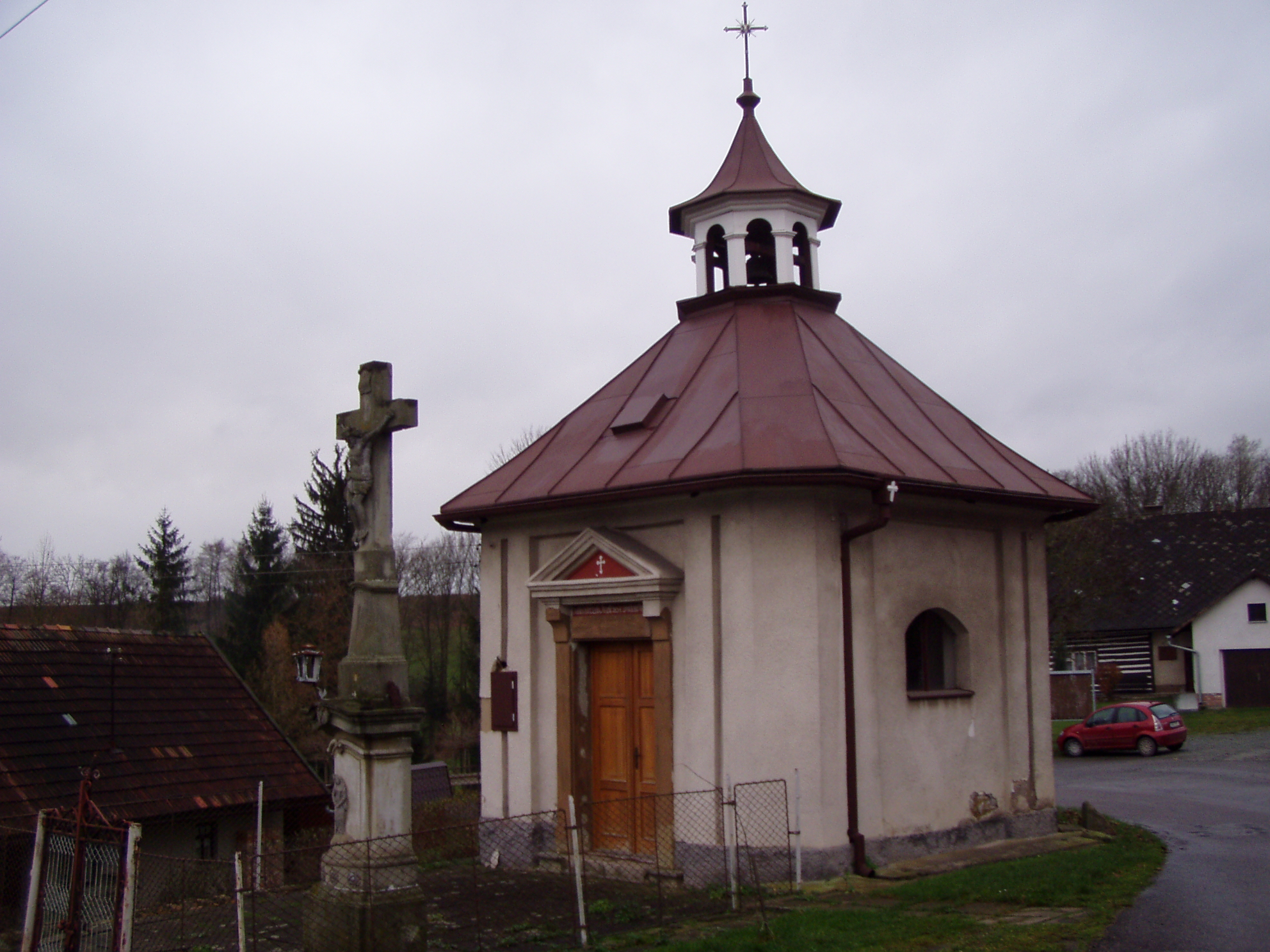 Kaple Navštívení Panny Marie (Masty)